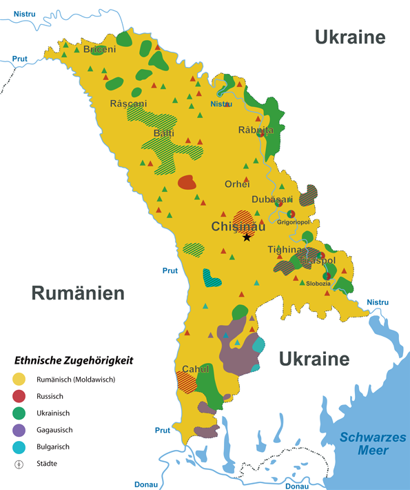 Ethnische Gruppen in Moldawien (Stand: Mai 1995)